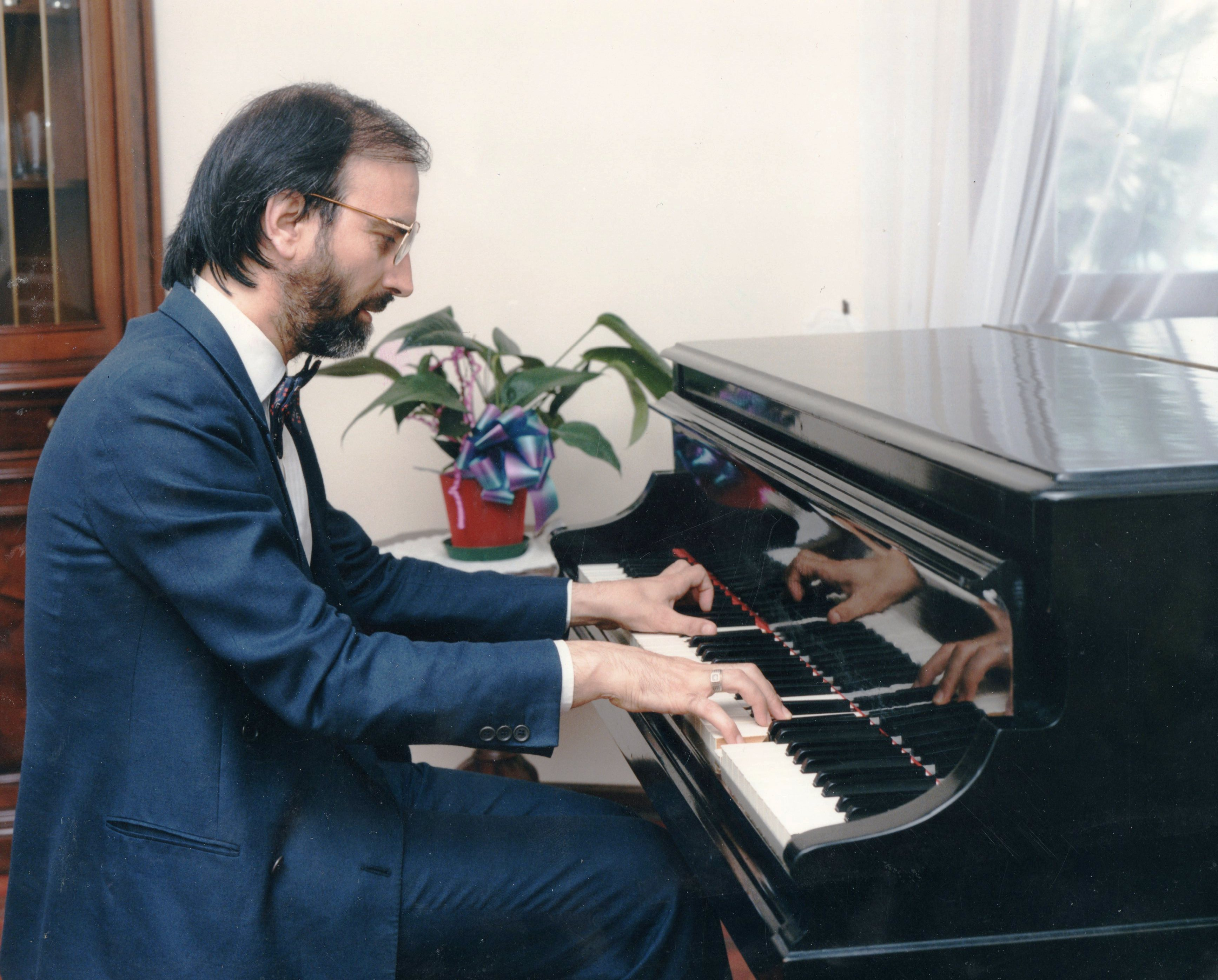 Italo Salizzato negli anni '80